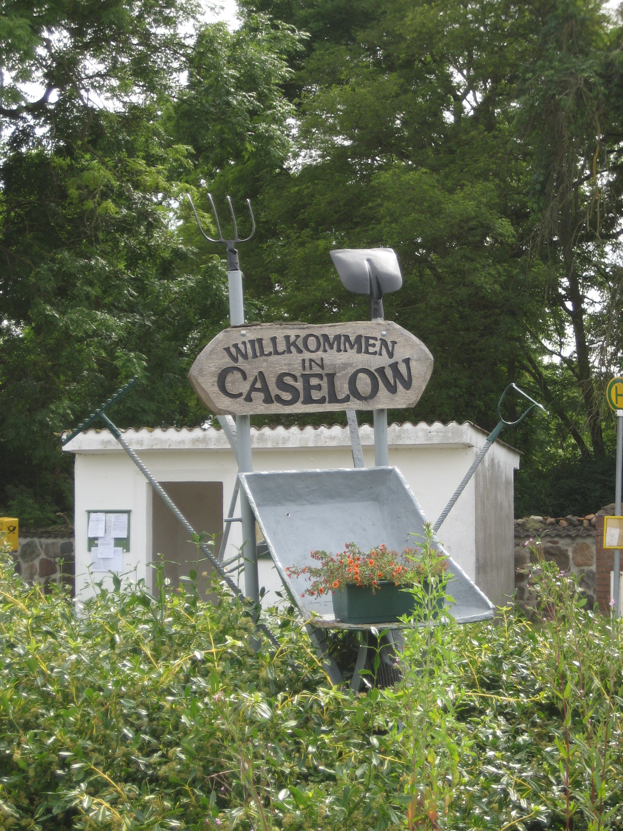 Der Dorfplatz mit Bushaltestelle in der Dorfmitte von Caselow.